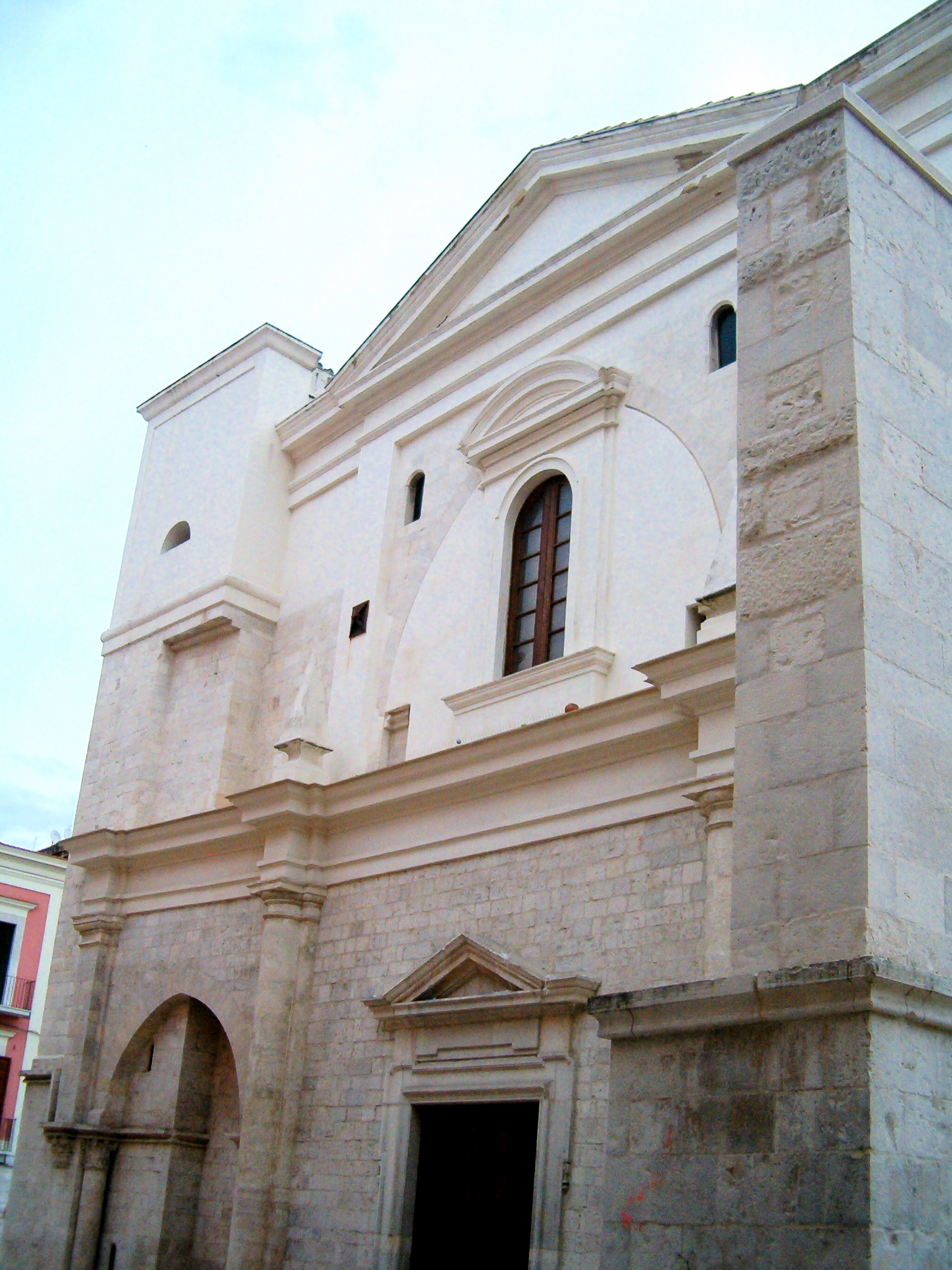 Barletta (Puglia, Italy). Chiesa d. S. Sepolcro